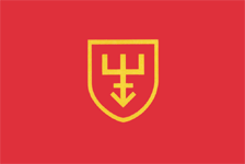 Прапор Купчині